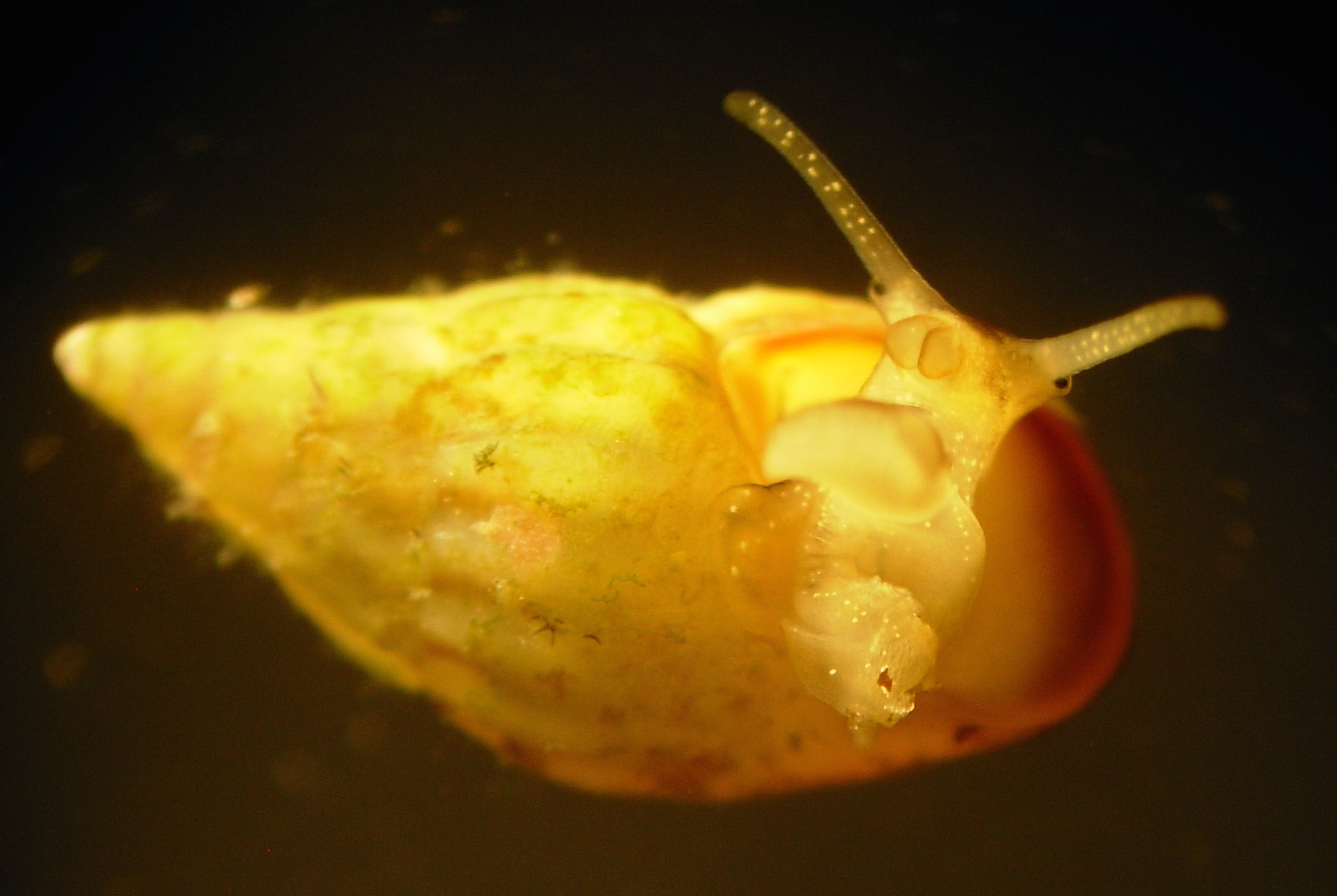 Rissoa membranacea. Animal émérgeant de sa coquille